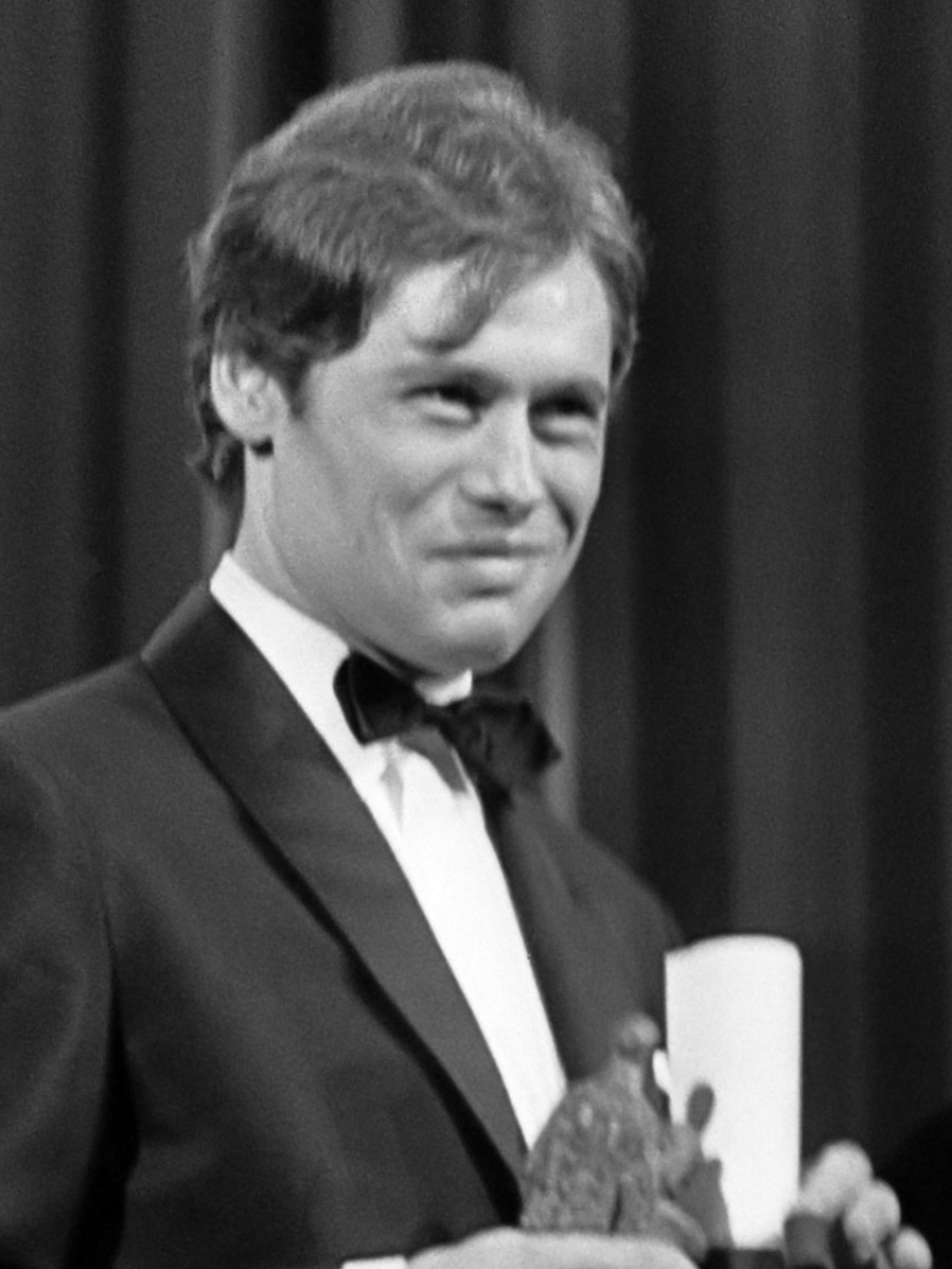 Grand Gala du Disque 1965 , Bob Bouber en Guus Oster 2 oktober 1965